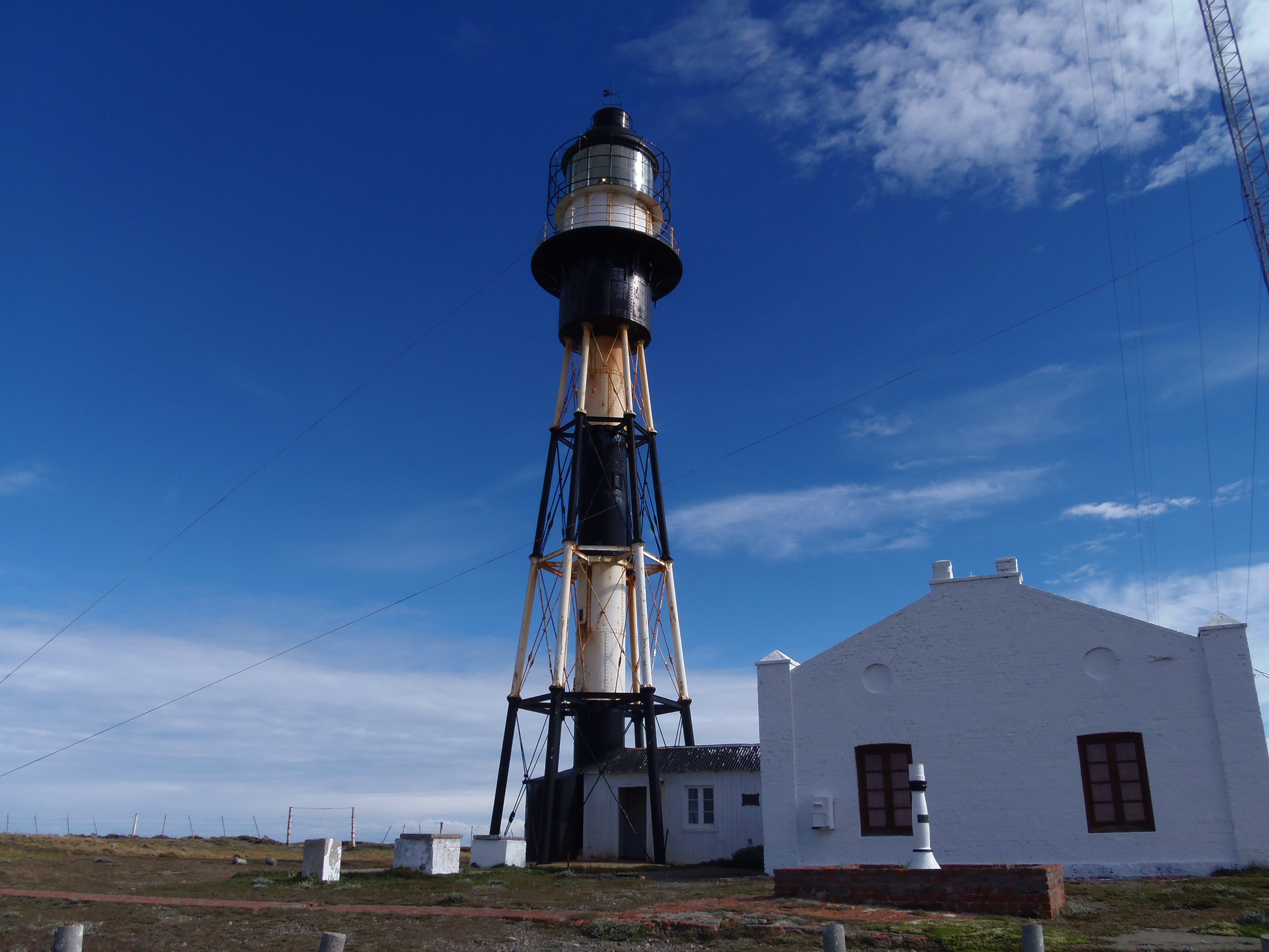 Cabo Virgenes, Provincia de Santa Cruz, Argentina.